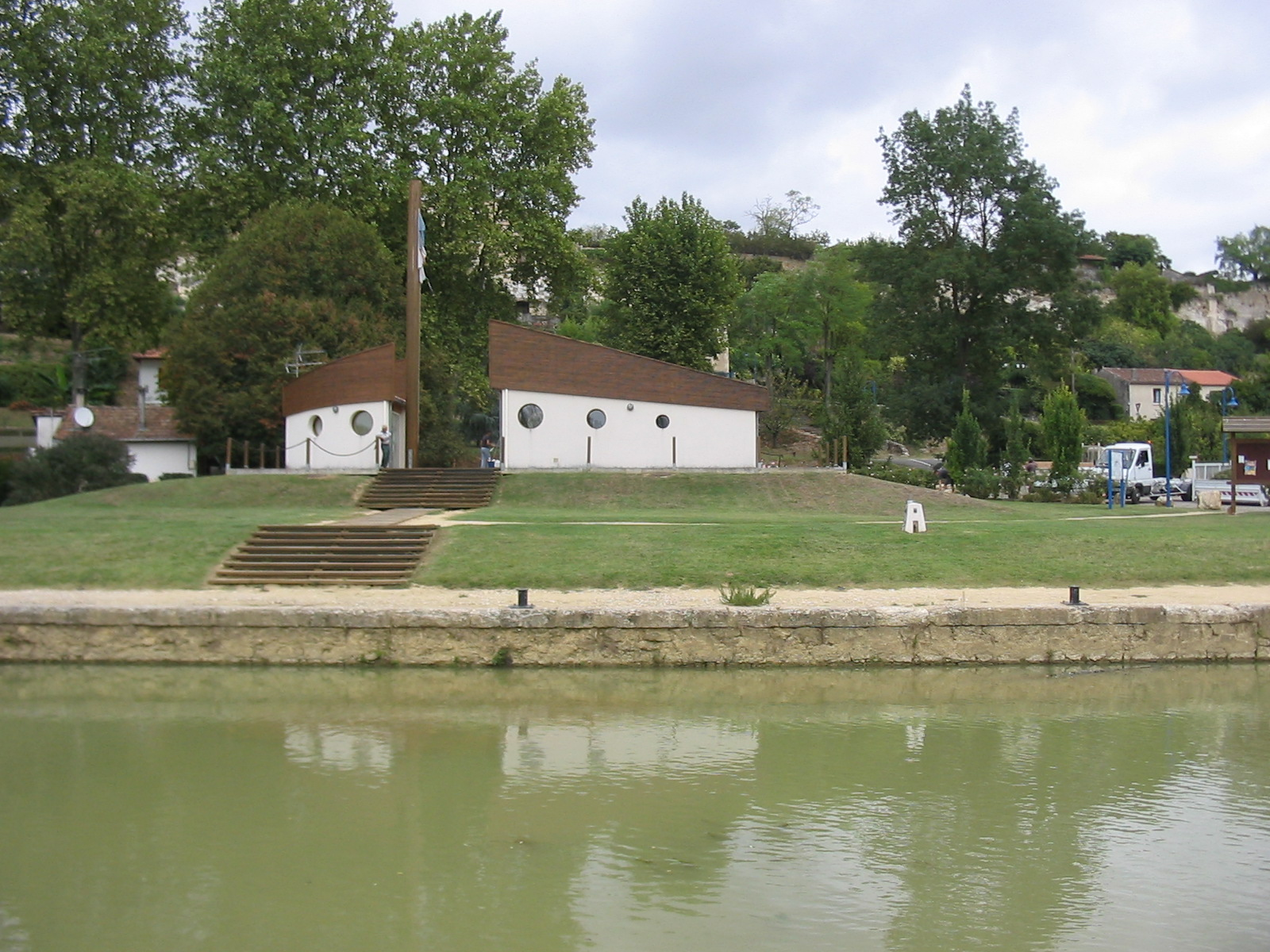 Der Freizeithafen von Valence-sur-Baïse am gleichnamigen Fluss